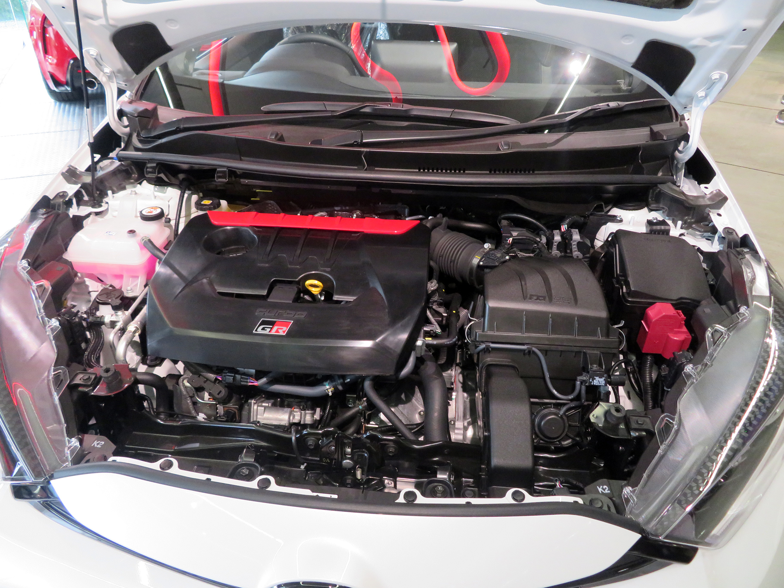 3BA-GXPA16型トヨタ・GRヤリスRZ"High performance"を撮影。